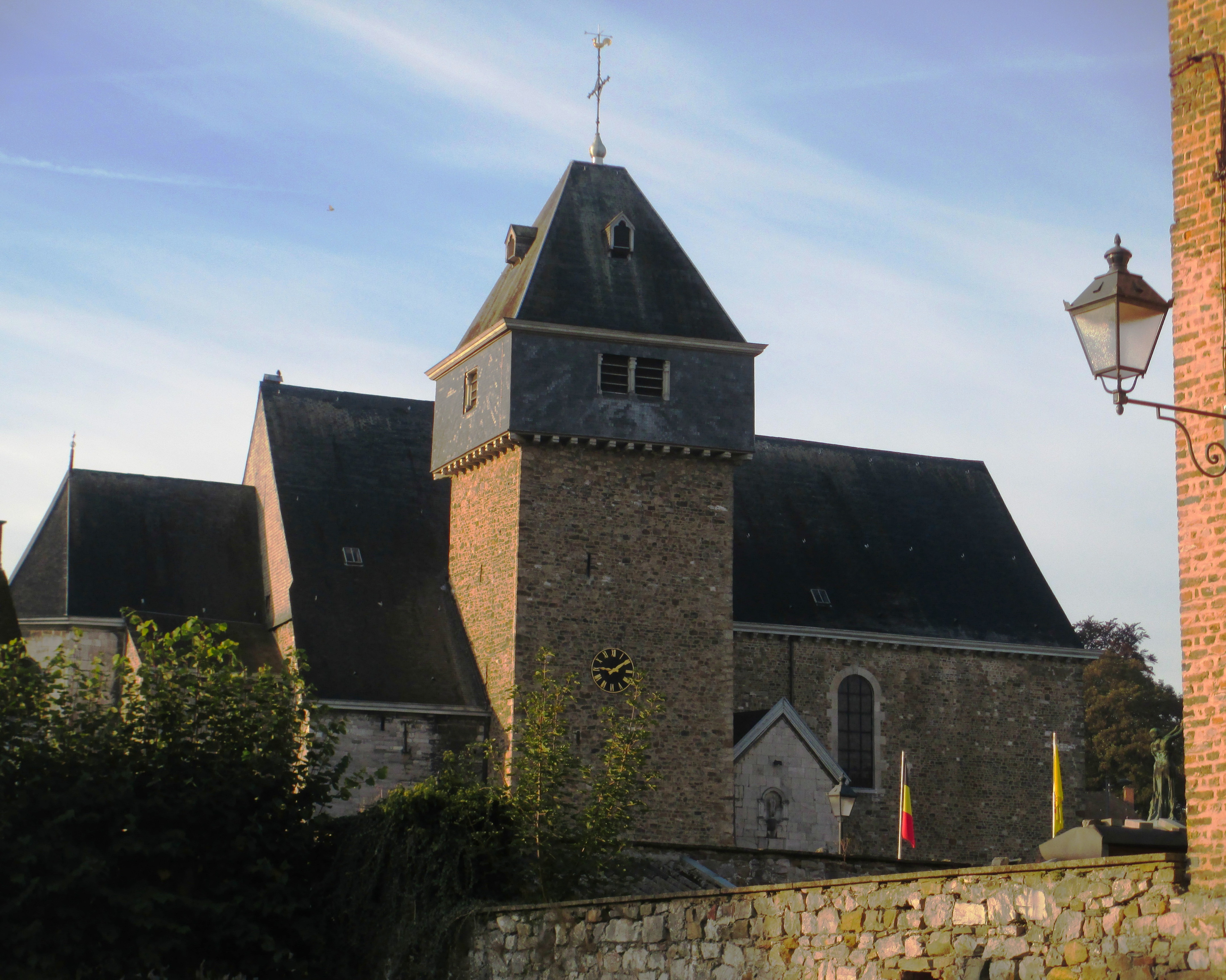 En avril 2002, la girouette de plus de 250 kg de la tour fortifiée de l’église Saints-Hermès-et-Alexandre de Theux avait été enlevée, pour des raisons de stabilité et de sécurité. En septembre 2015, l’on a procédé à la réinstallation de sa croix et son coq.